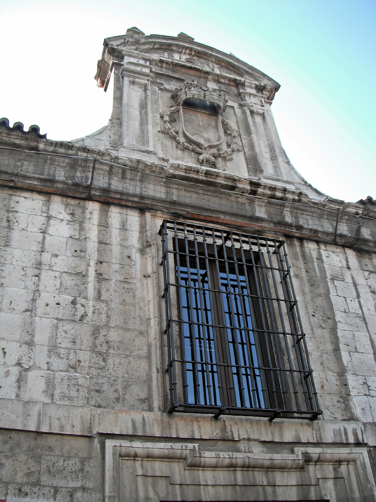 Cárcel Vieja (Valladolid)